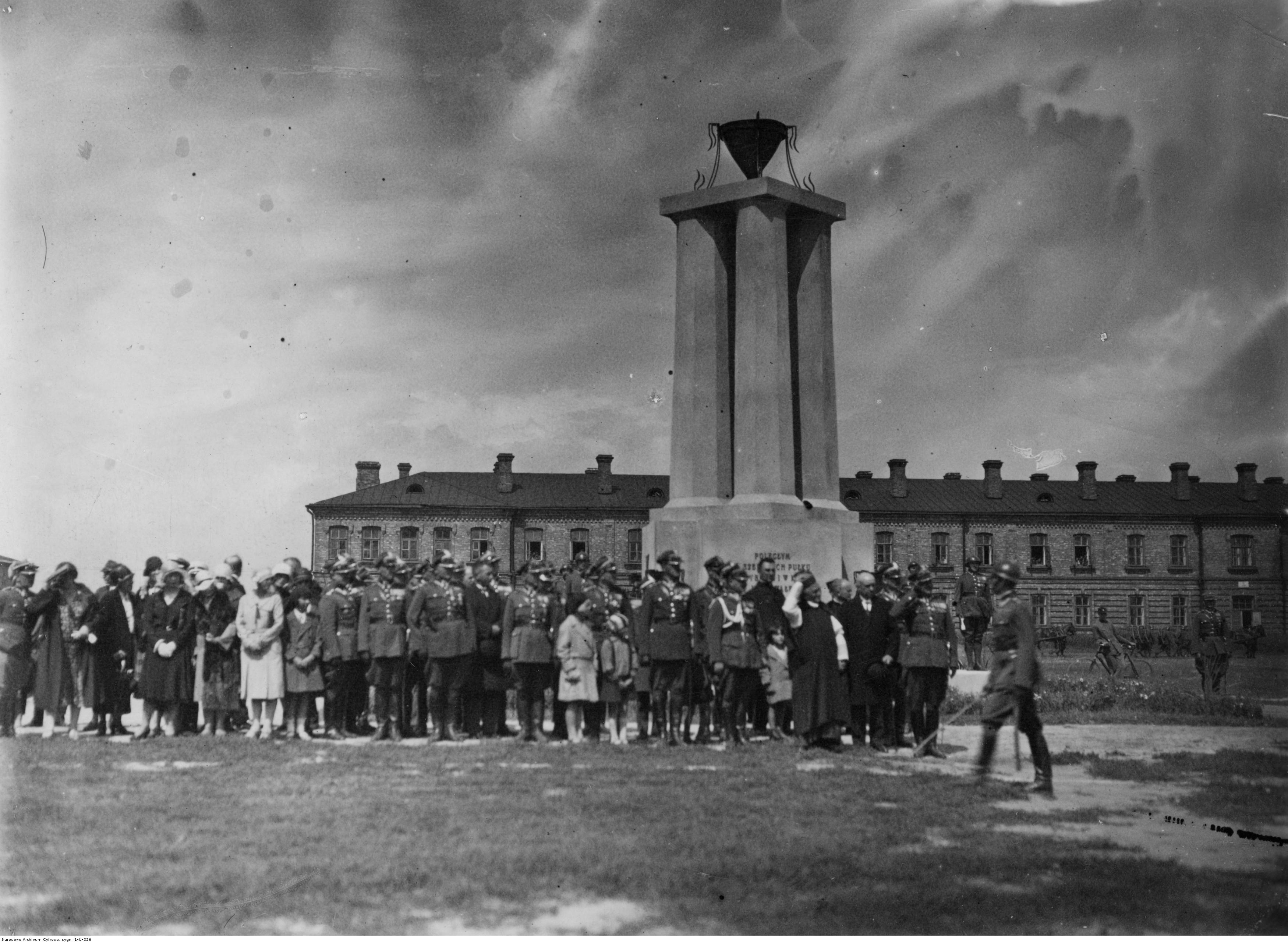 Odsłonięcie w Brześciu nad Bugiem pomnika ku czci poległych w I wojnie światowej. Koncern Ilustrowany Kurier Codzienny - Archiwum Ilustracji. Sygnatura: 1-U-326